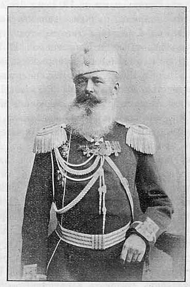 генерал Густав-Аксель Фердинандович фон Котен